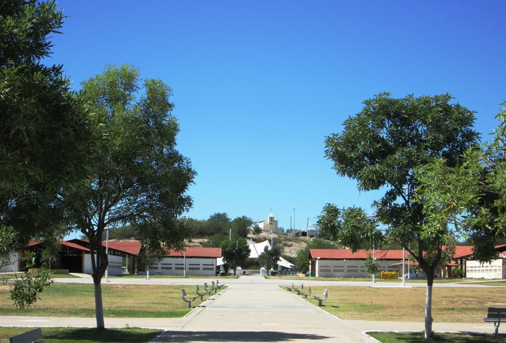 Complexo Turístico Ilha de Sant'Ana.